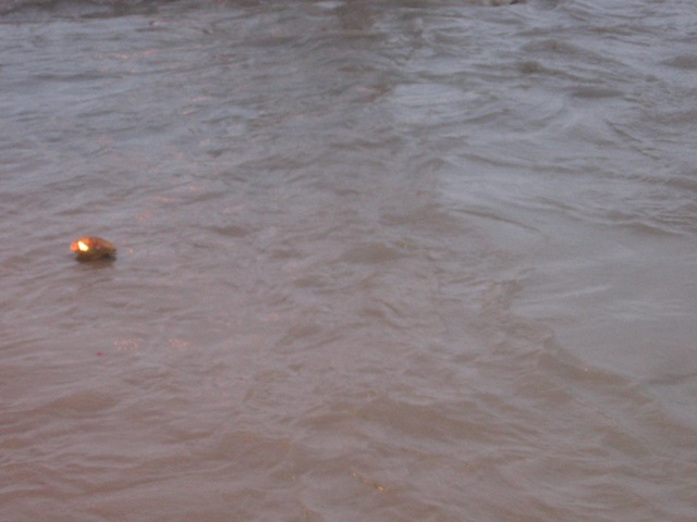 פוג'ה בדיוואלי רישיון נוצר על ידי משתמש:Motyka